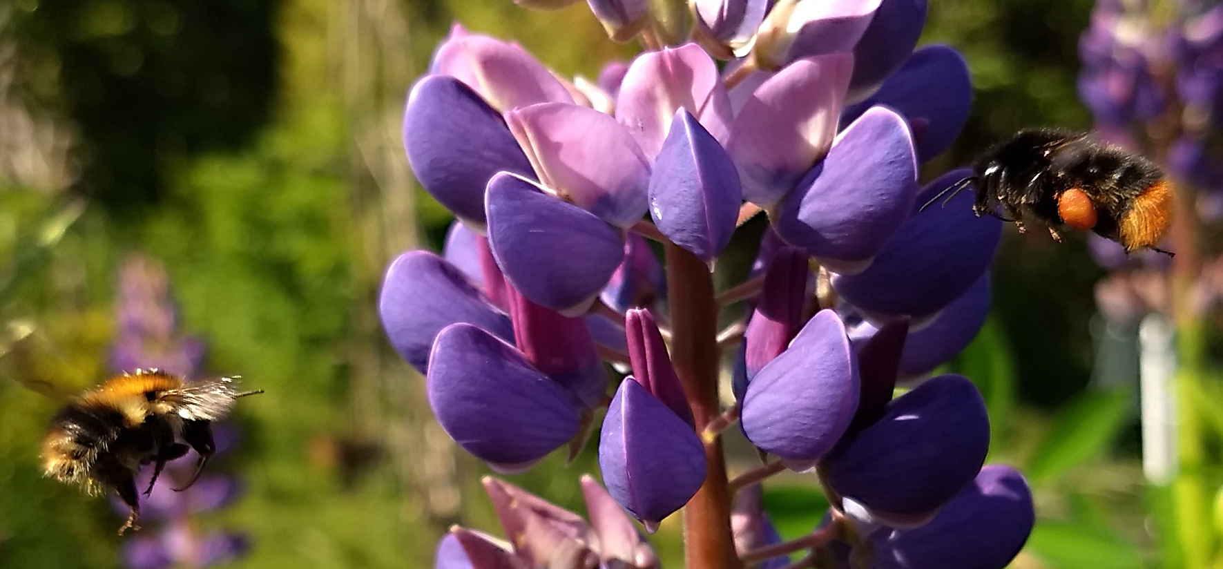 Hummeln im Flug an einer Lupine